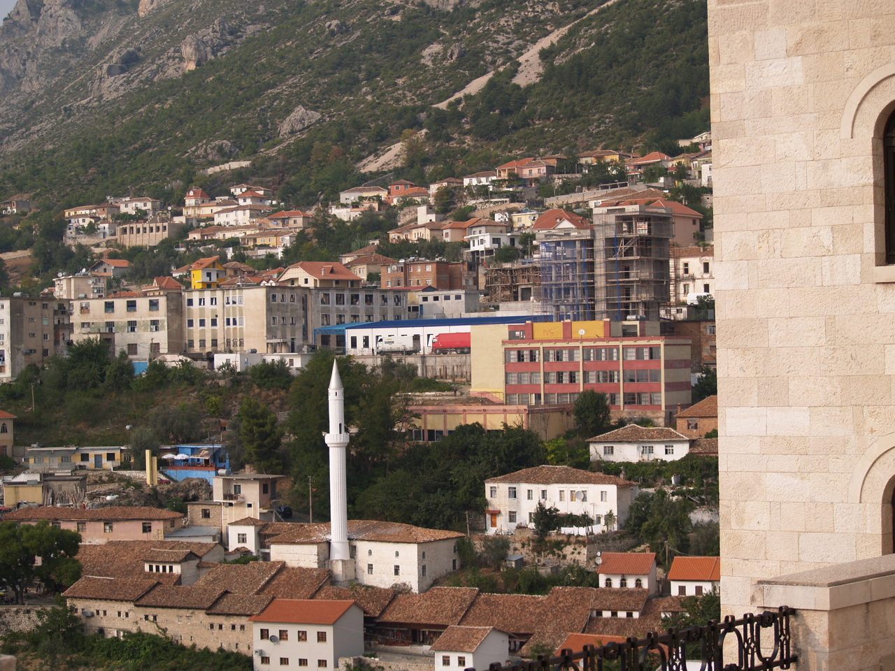 Kruje Albania